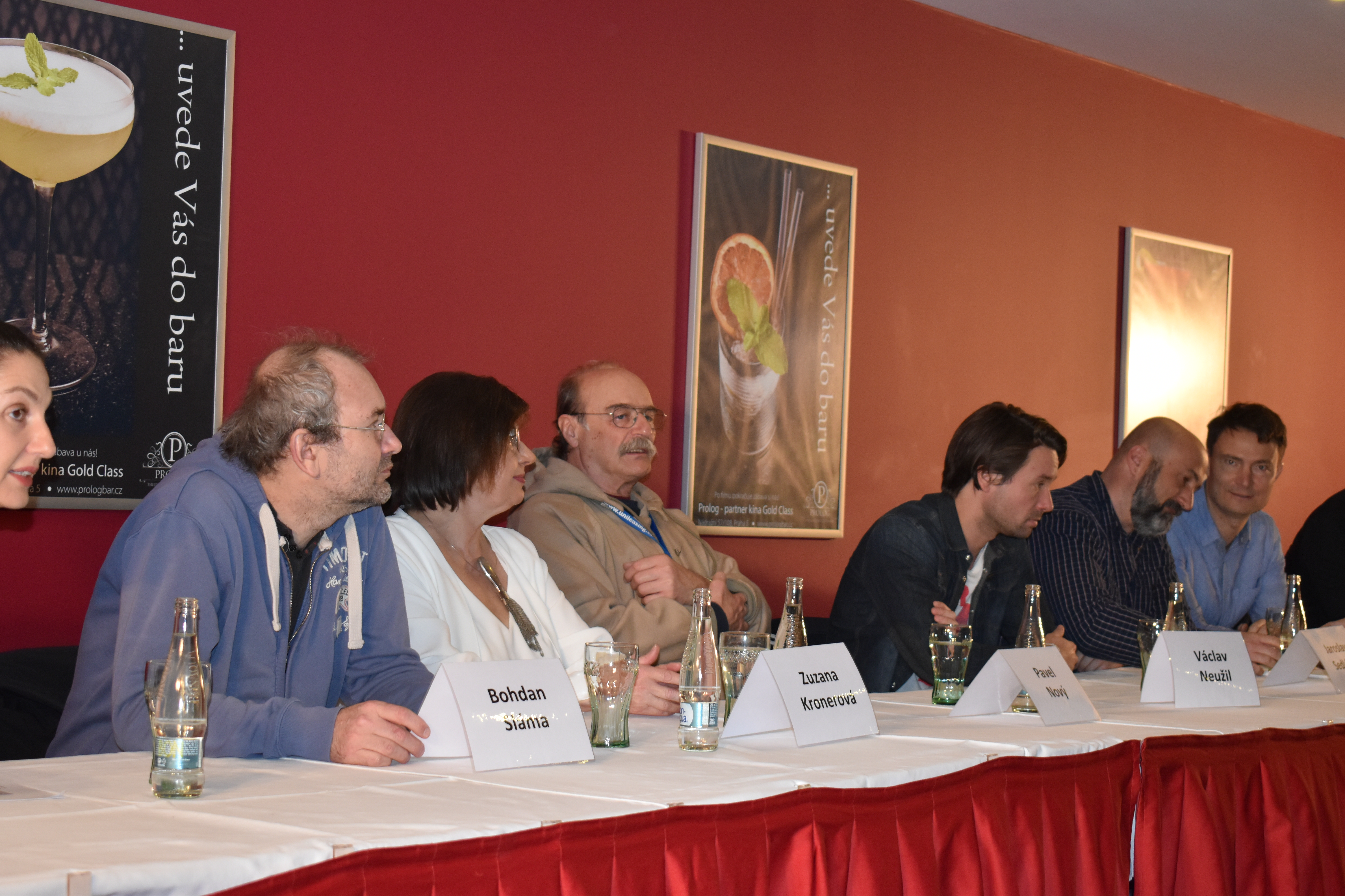 Fotka z novinářské konference 21.2.2017. Autor: Blanka Borová (Karolína Černá) pro Kritiky.cz